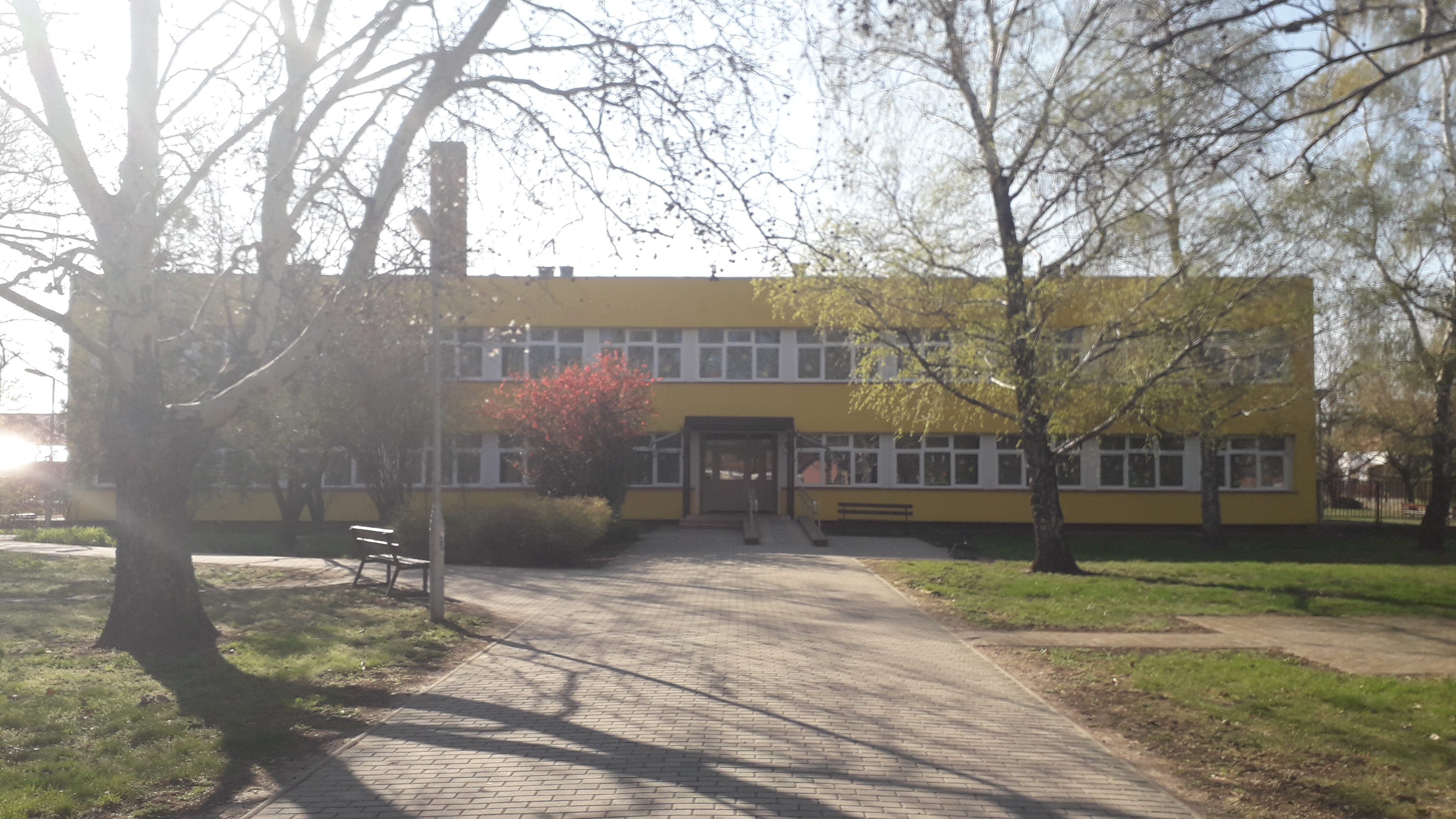 Nagyszénási Czabán Samu Általános Iskola felső tagozata